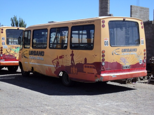 COLECTIVOS REDUCIDOS DE URBANO